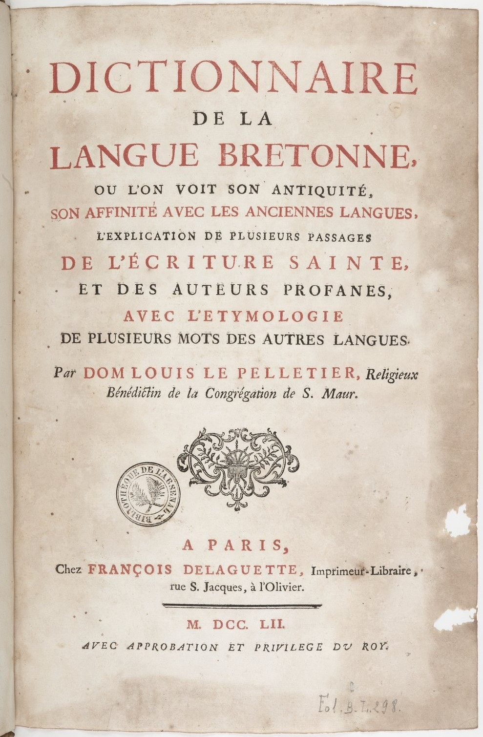 Page de titre du Dictionnaire de la langue bretonne de Dom Louis Le Pelletier